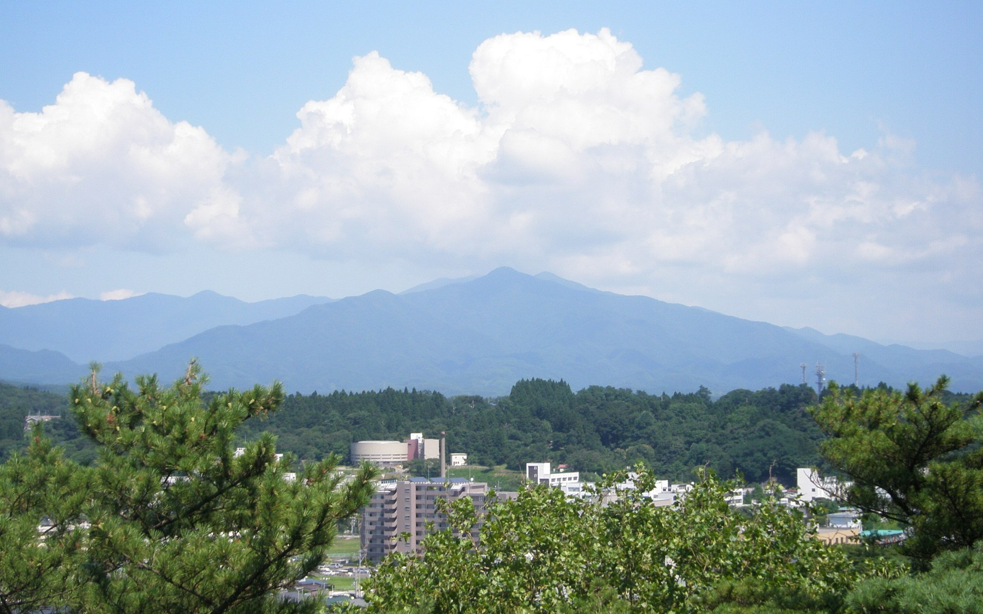 太平山、千秋公園内久保田城御隅櫓より望む。